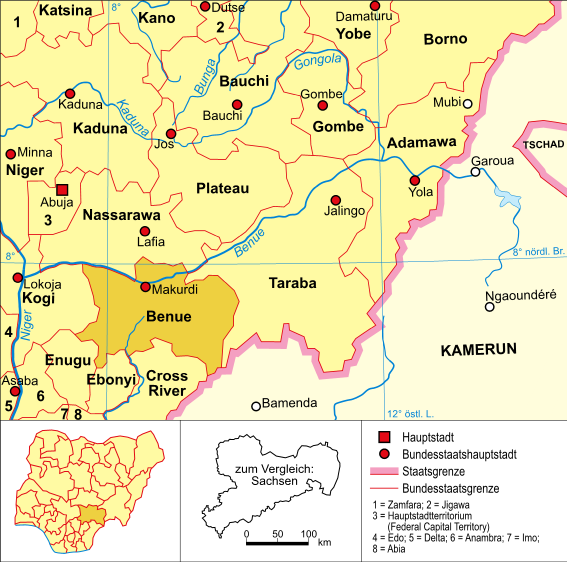 Politische Karte Nigerias (Bundesstaat Benue hervorgehoben)